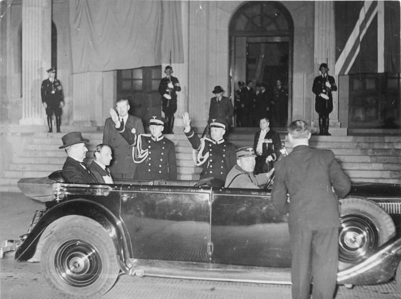 Scherl: Historische Stunden in München U.B.z: der britische Premierminister verläßt in einer Verhandlungspause den Führerbau, um sich auf kurze Zeit in sein Hotel zu begeben, begleitet von Sir Horace Wilson 29.9.38 12899-38 ADN-ZB/Archiv Zum Viermächte-Abkommen in München am 29.9.1938 UBz: Der britische Premierminister Neville Chamberlain verläßt in einer Verhandlungspause den Führerbau, um sich auf kurze Zeit in sein Hotel zu gegeben, begleitet von Sir Horace Wilson.